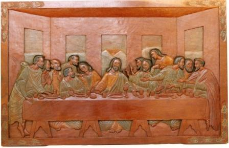 trabalho entalhado em madeira (mogno)